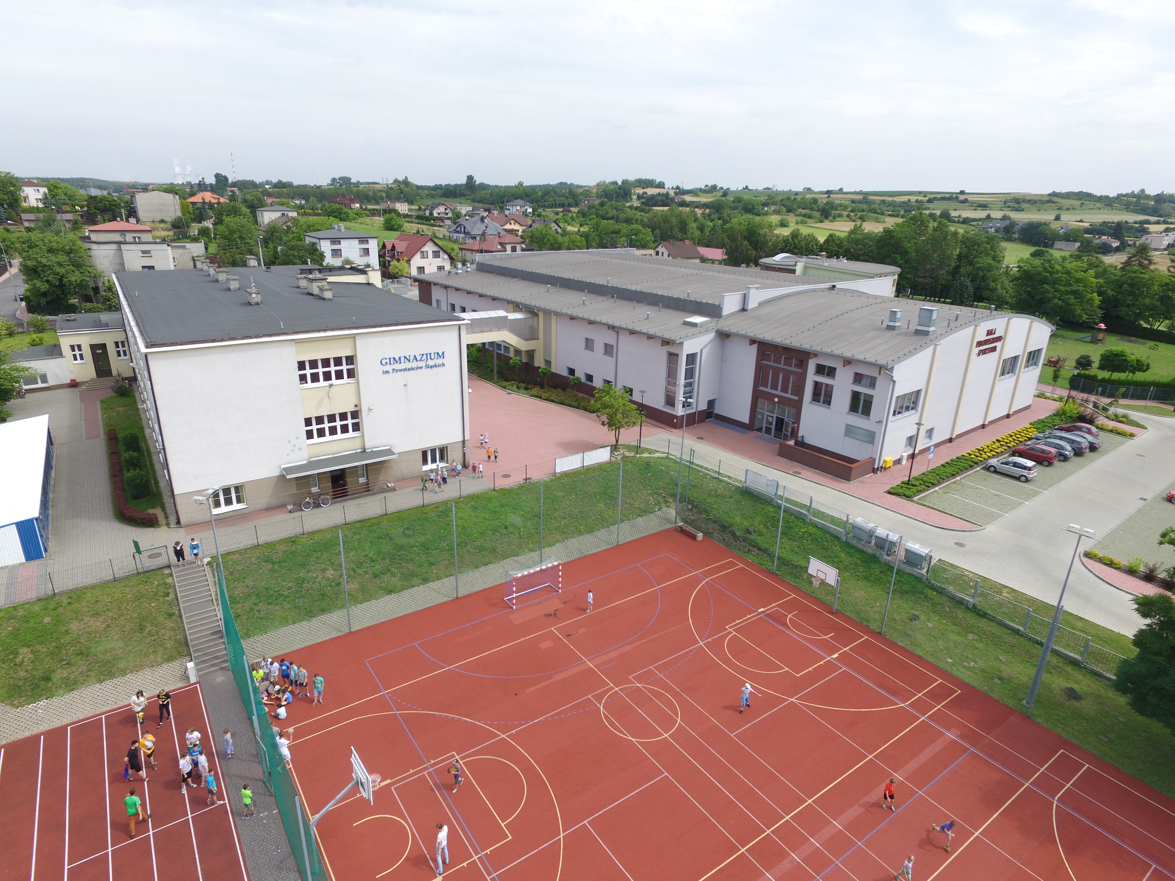 Gimnazjum im. Powstańców Śląskich i Hala Widowiskowo - Sportowa w Imielinie wraz z infrastrukturą towarzyszącą.